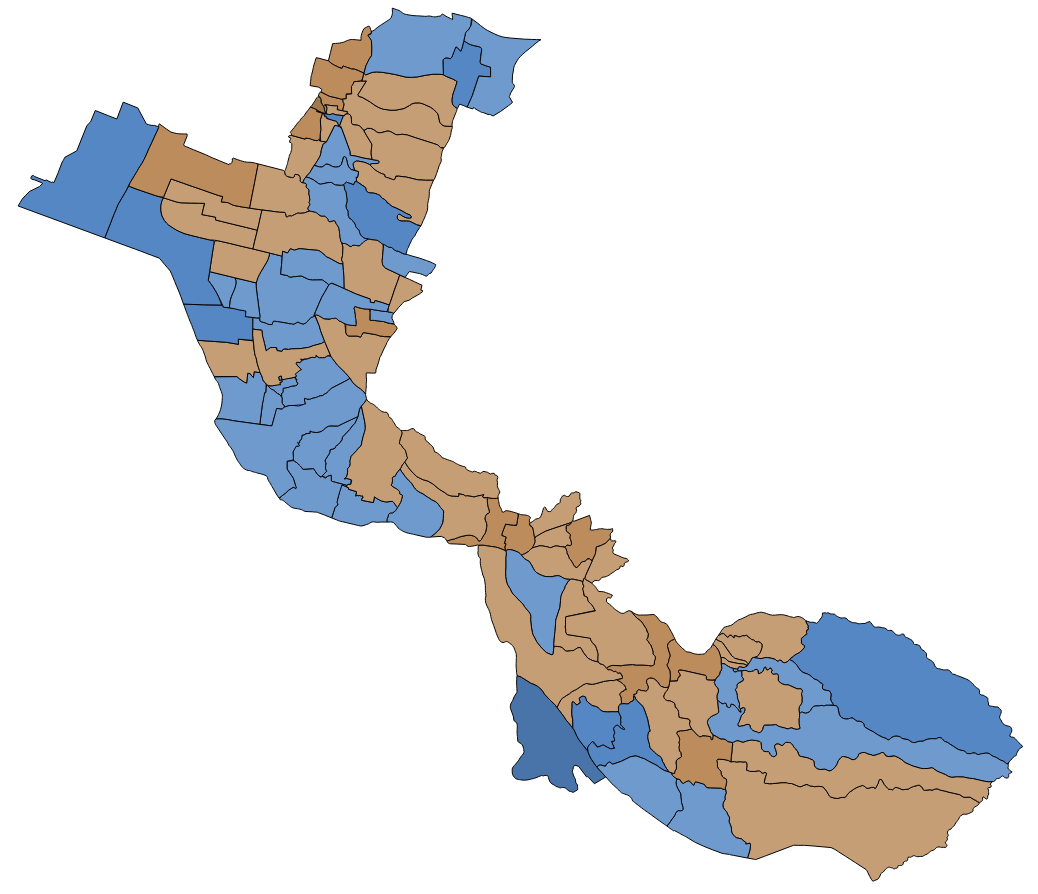 顏色對照表